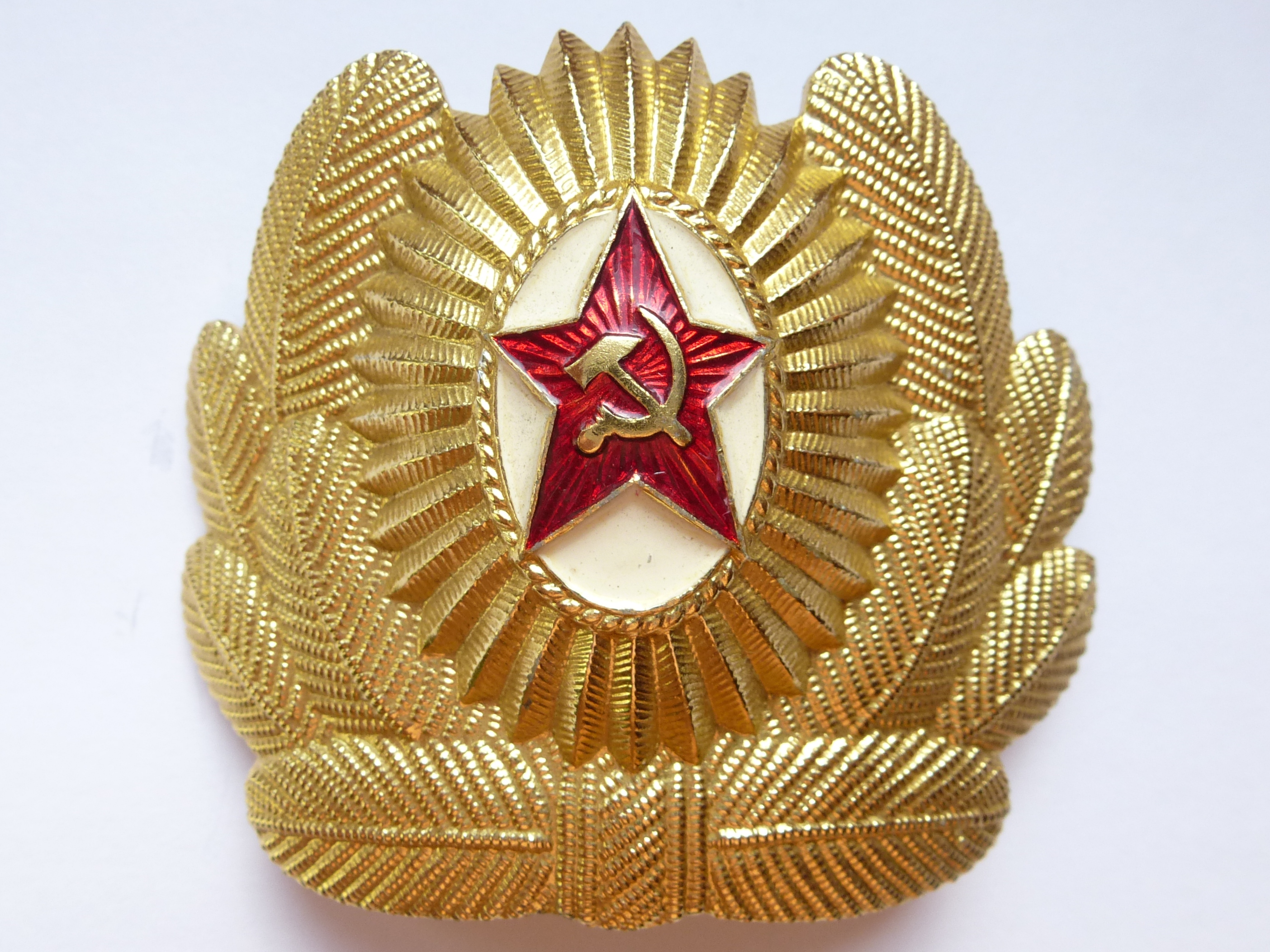 Кокарда на шапку-ушанку и фуражку для повседневной формы одежды офицеров ВВС и ВДВ Вооружённых Сил СССР. 1969-1991 г.г.